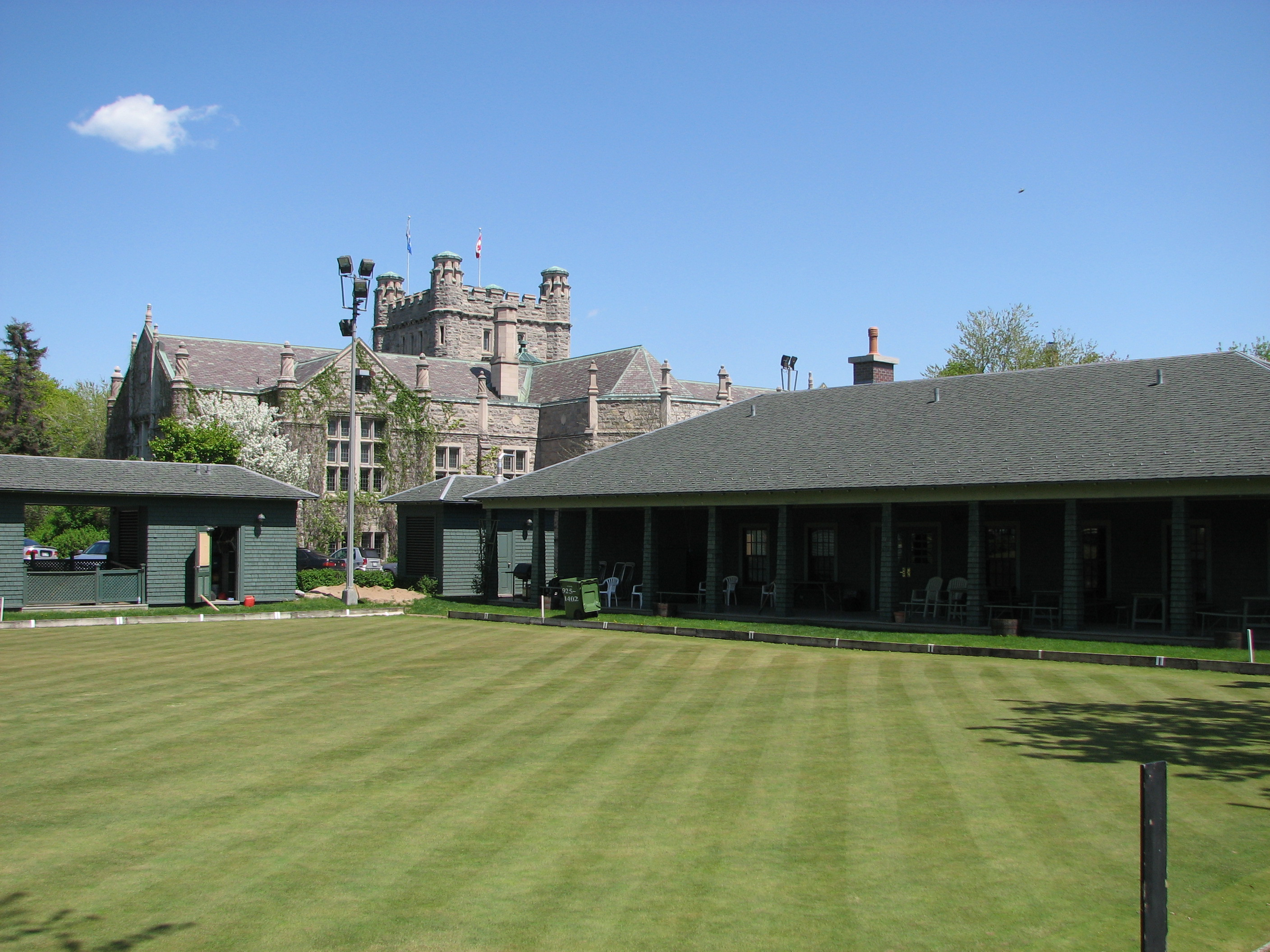 Terrain de boulingrin de Westmount (Québec), Canada, avec l'Hôtel de Ville en arrière-plan